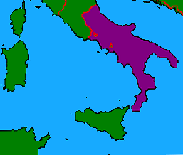 Parthenopeïsche Republiek, zelf gemaakt op basis van andere kaart